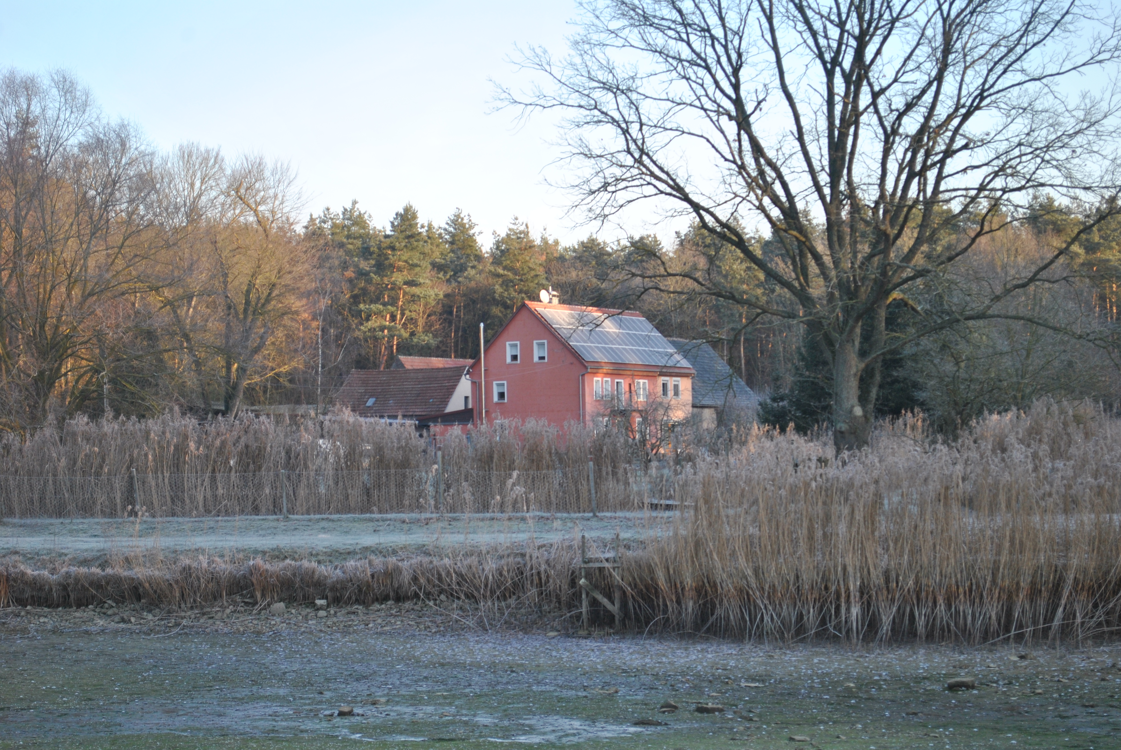 Ehemalige Wasenmeisterei, heute Düllstadt, Ortsteil Schwarzach am Main